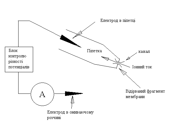 Схема patch-clamp в конфигурації inside-out